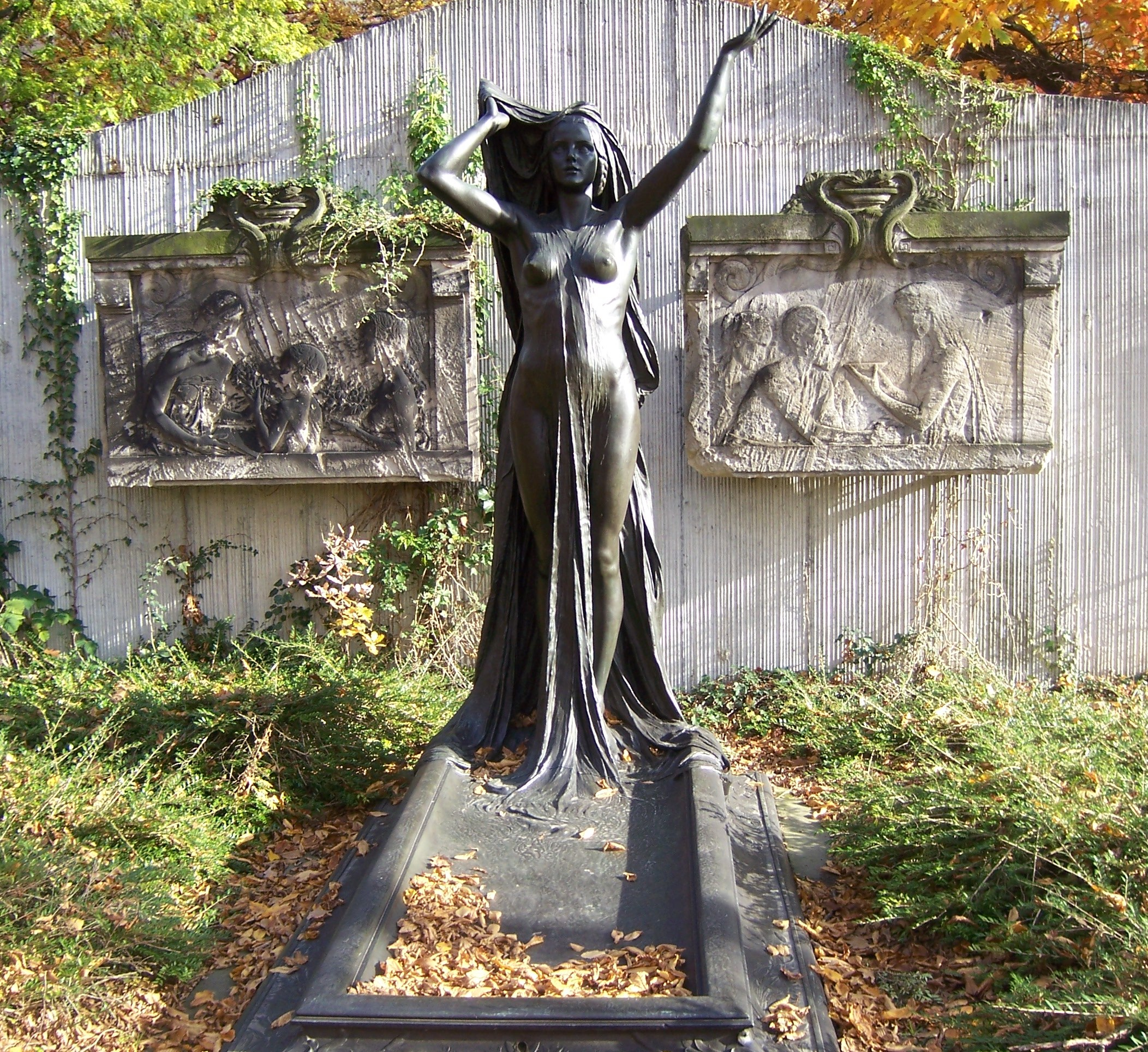 Gruftplatte und Skulptur vom Grabmal Willmar Schwabe auf dem Neuen Johannisfriedhof Leipzig. Entwurf Josef Mágr 1908. Heutiger Standort: Lapidarium Alter Johannisfriedhof Leipzig.